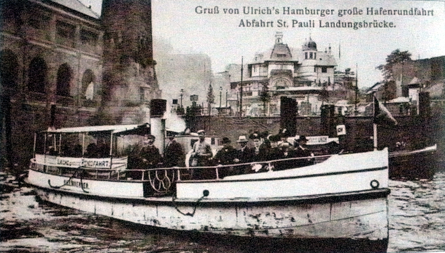 ulrich's große hafenrundfahrt hamburger hafen vor den st. pauli landungsbrücken